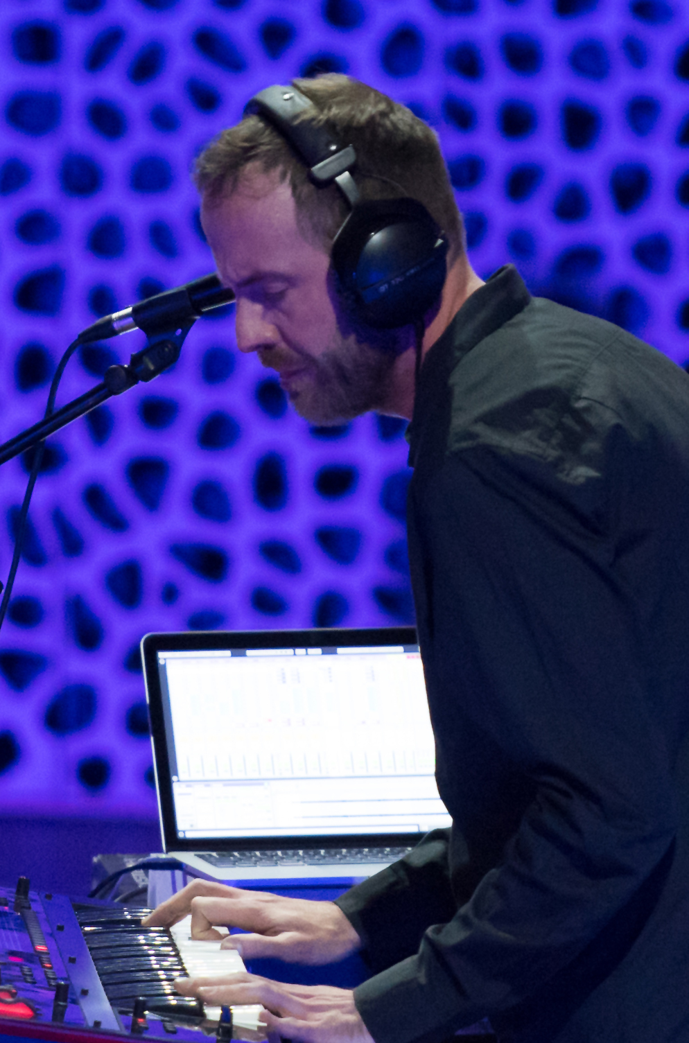 Tangerine Dream bei der Quantum of Electronic Evolution Tour in der Elbphilharmonie Hamburg 2018